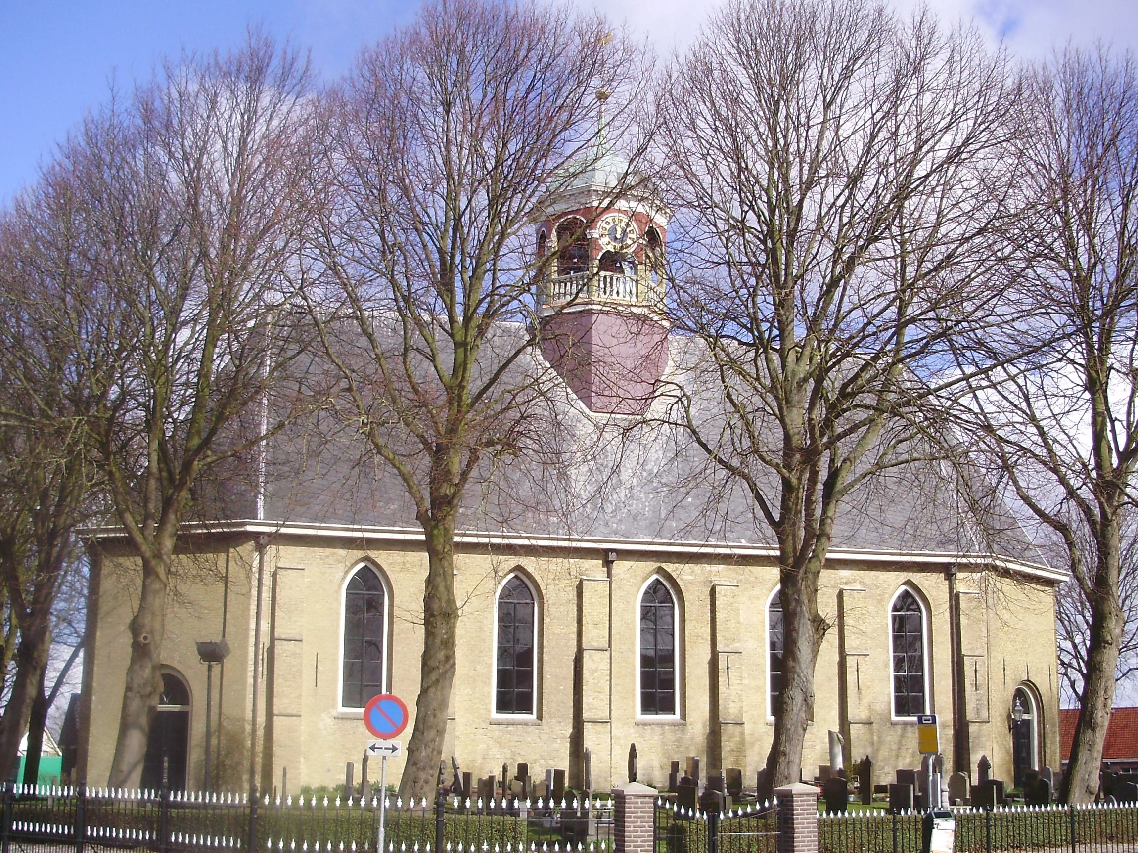 Hervormde kerk in Witmarsum, provincie Friesland